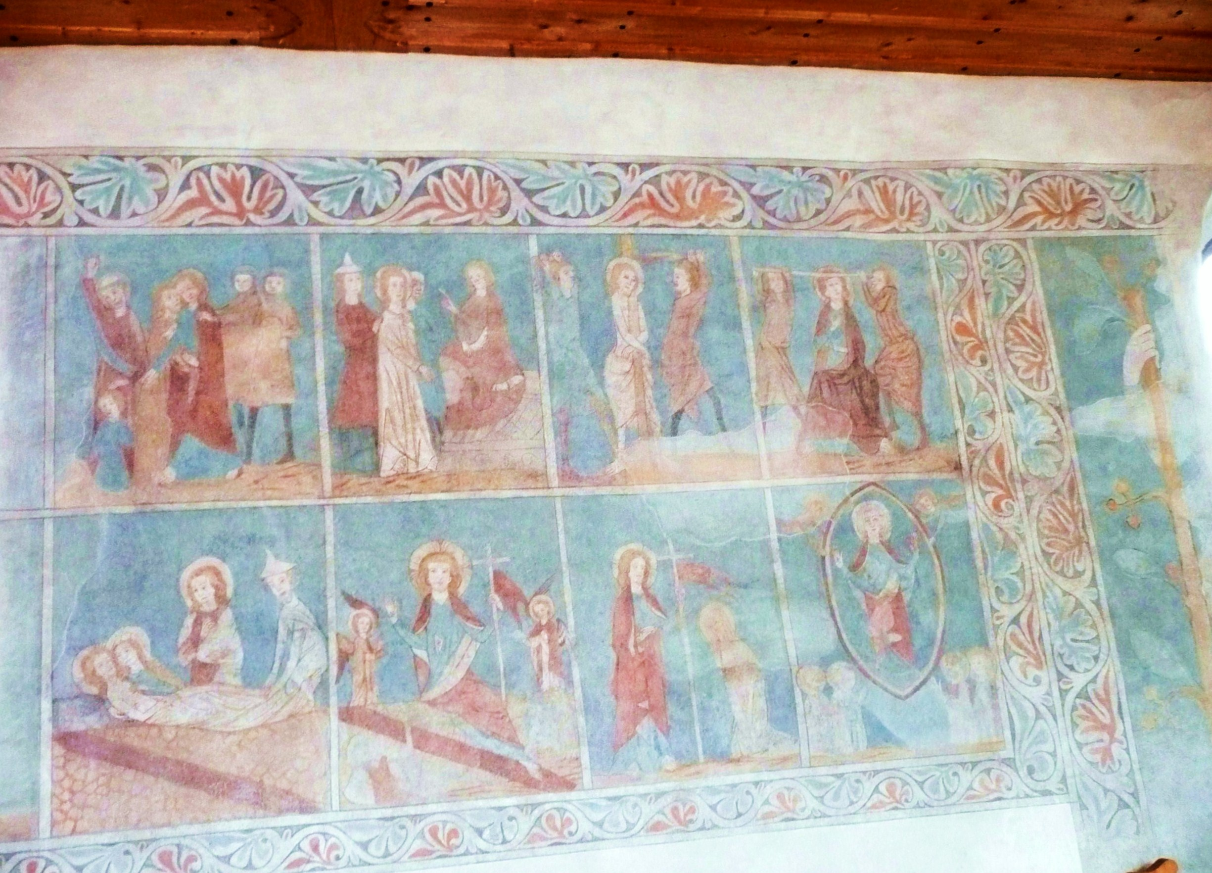 Gotische Wandmalereien in der St. Sebastianskapelle in Buch bei Frauenfeld/TG.